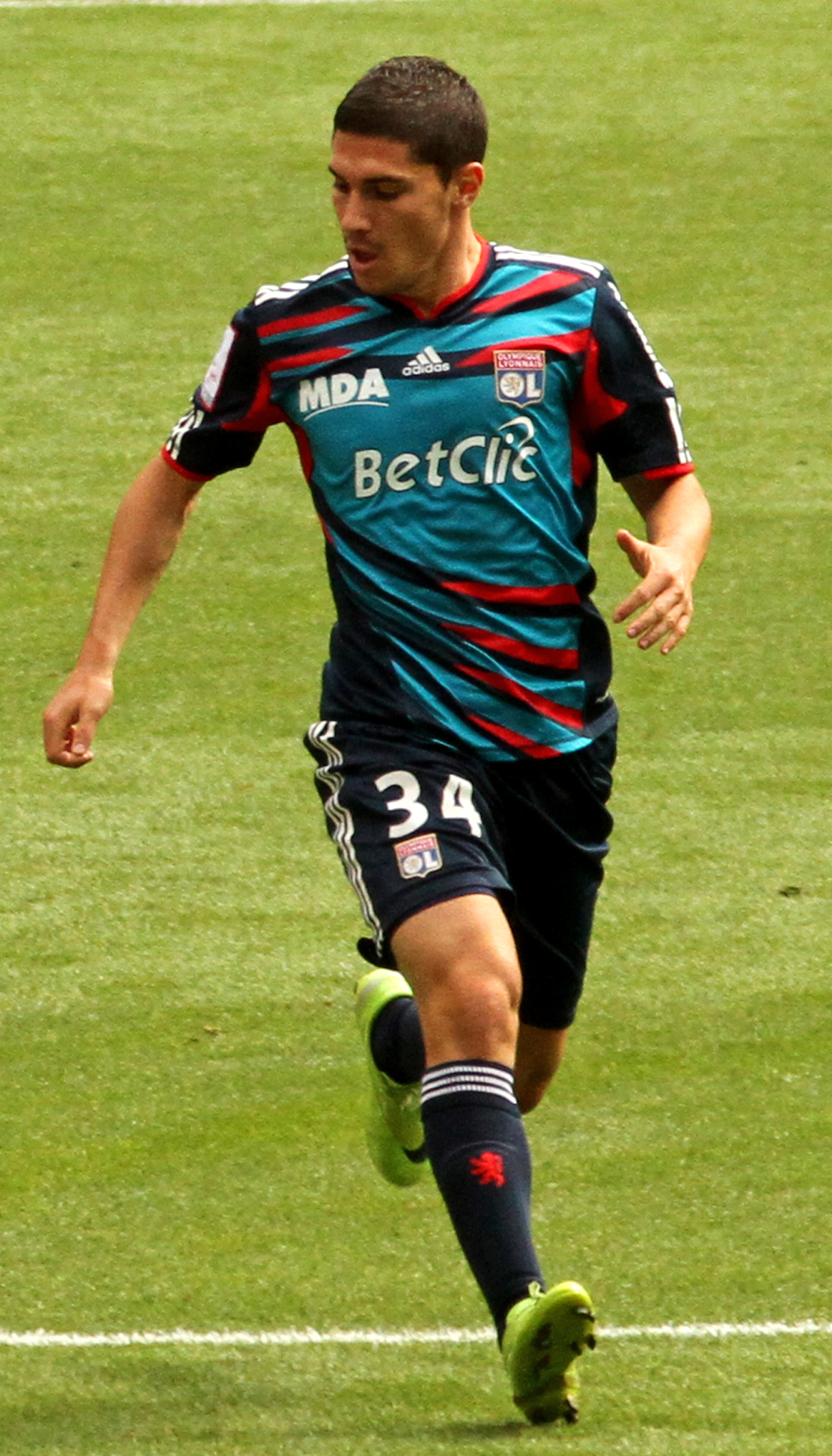 Dejan Lovren, James Forrest & Jeremy Pied